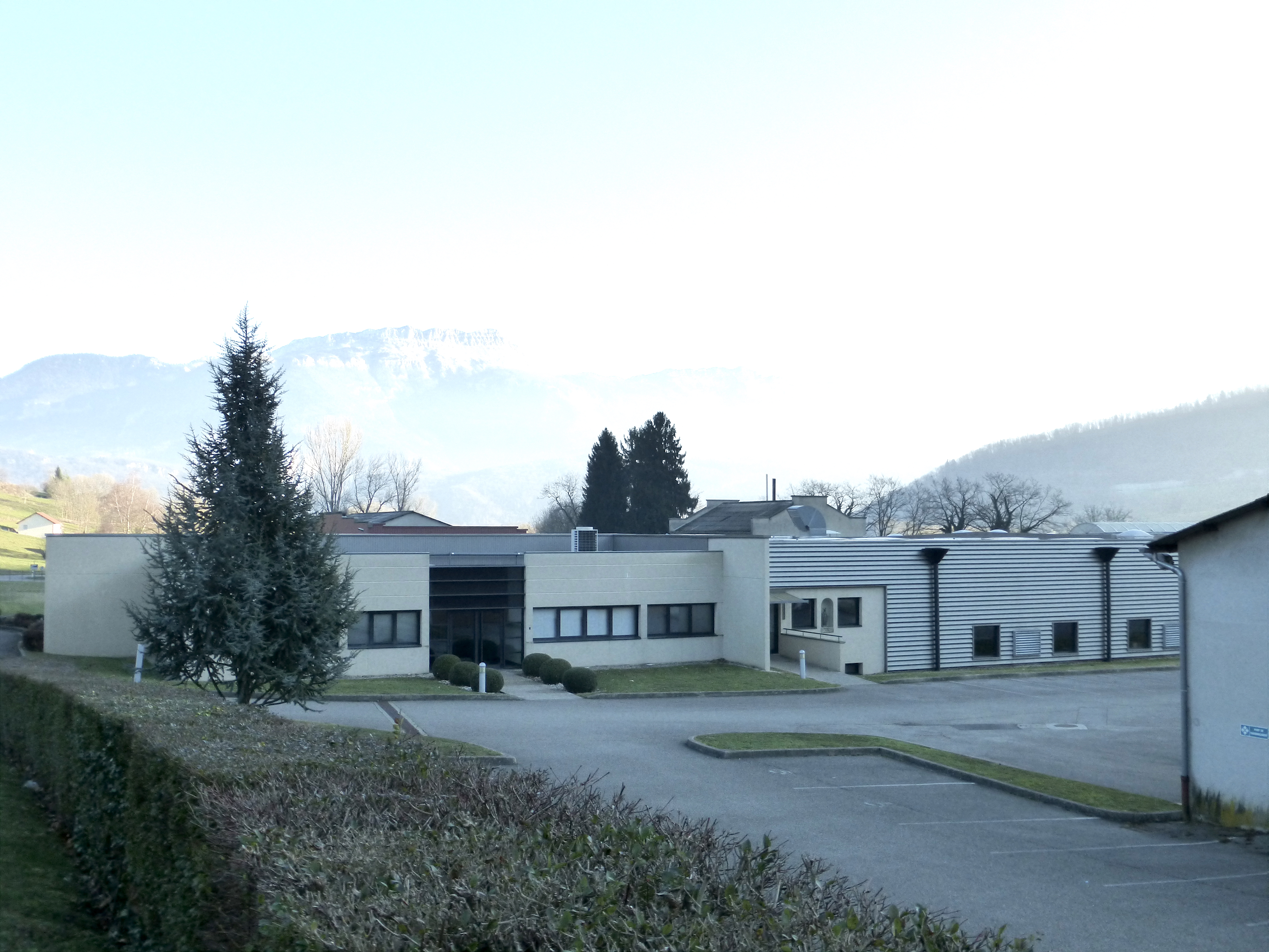 Usine de la société SITPM (Société Industrielle de Tissages Paul Merle). Saint-Nicolas-de-Macherin, Isère, France. Décembre 2016